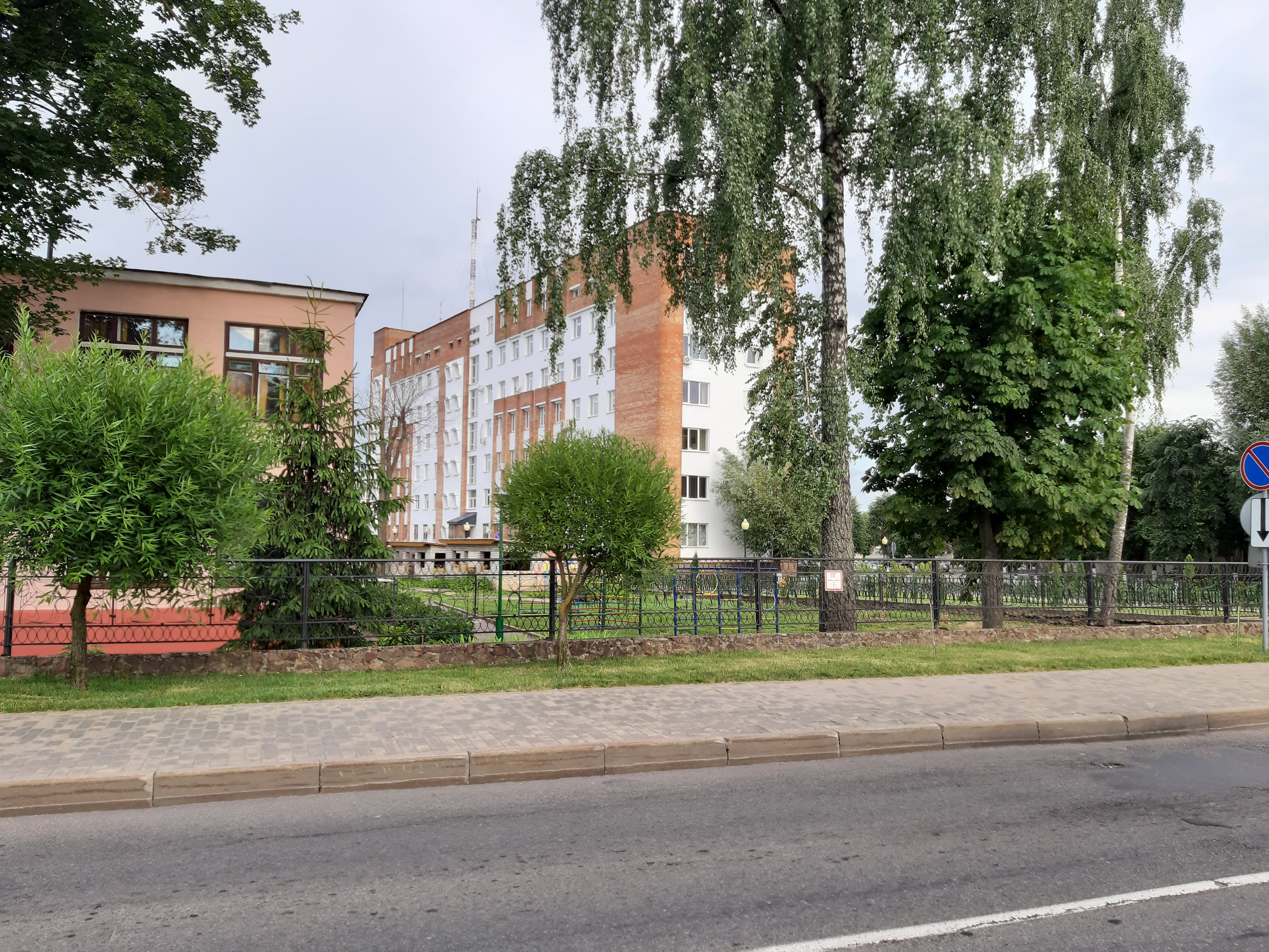 Магілёў. К. Маркса да Буянава